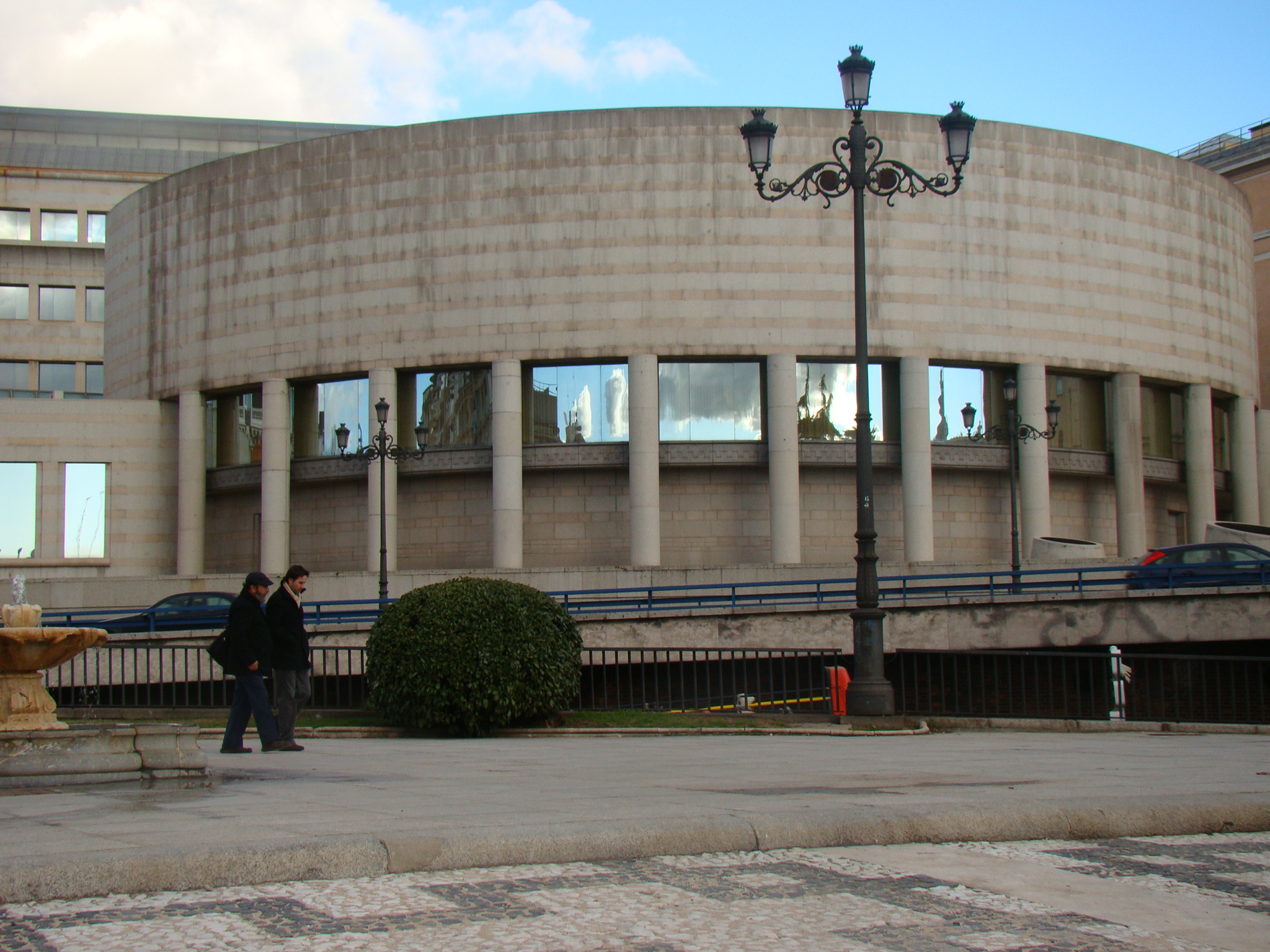 Edificio nuevo del Senado de España.